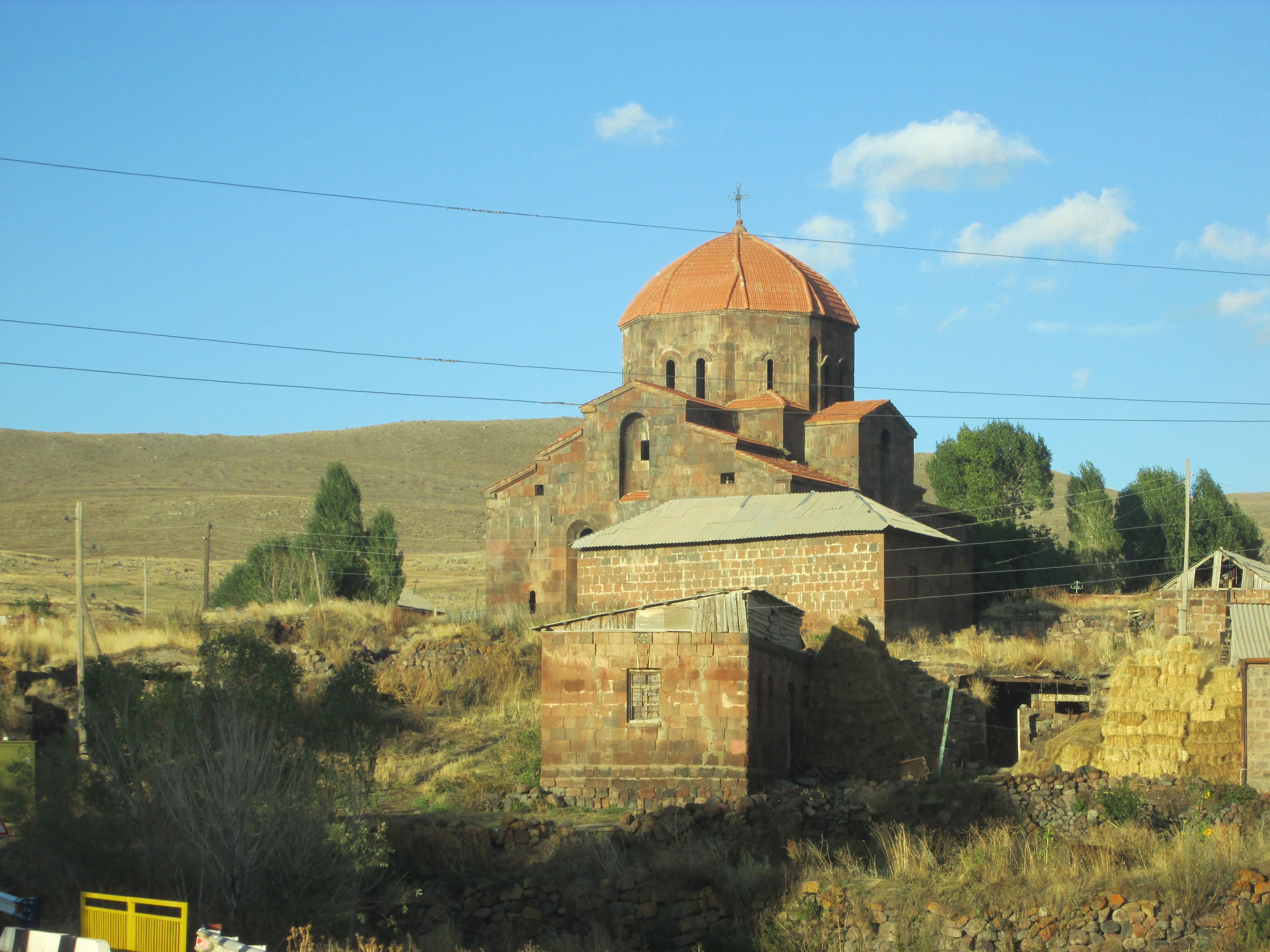 Ս. Գևորգ եկեղիցի, Գառնահովիտ, 7-րդ դար 29/8